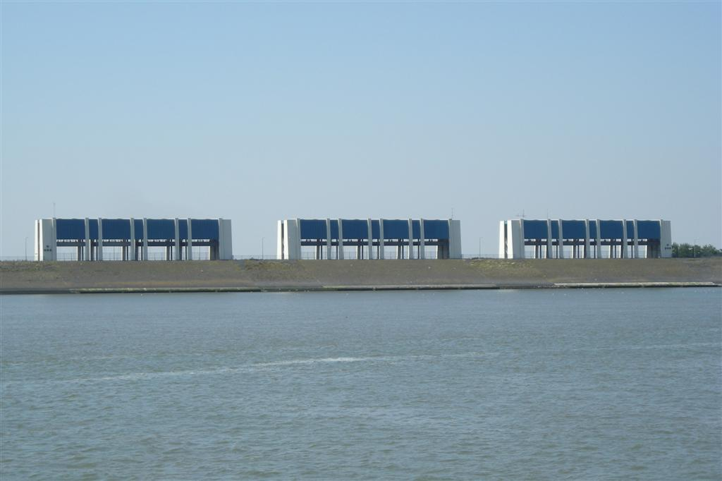 Lauwerssluizen / Canal Lock